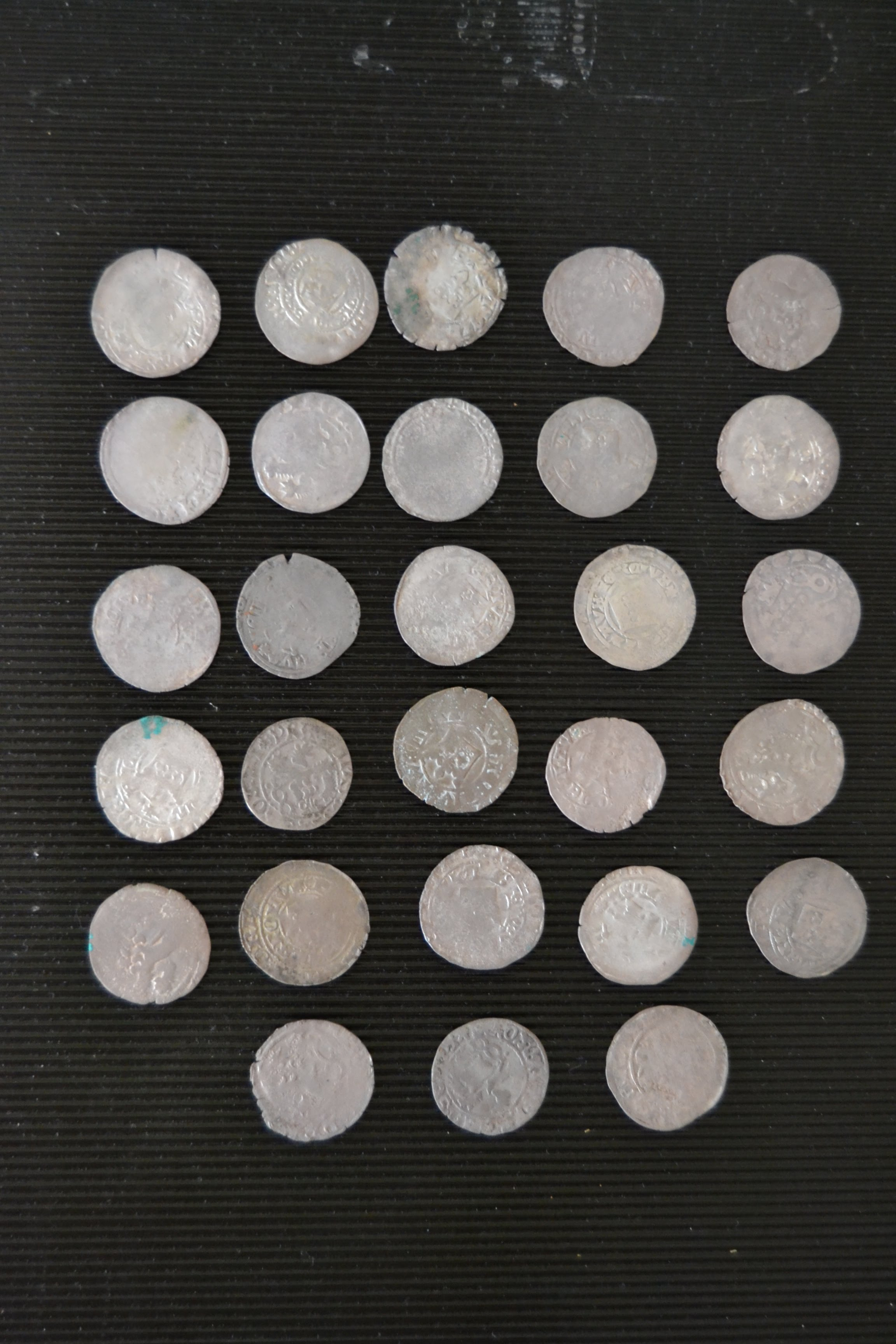 NÁLEZ